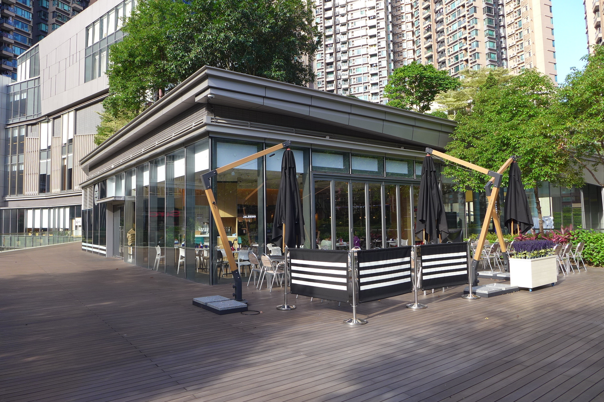 YOHO Mall Level 1 Podium